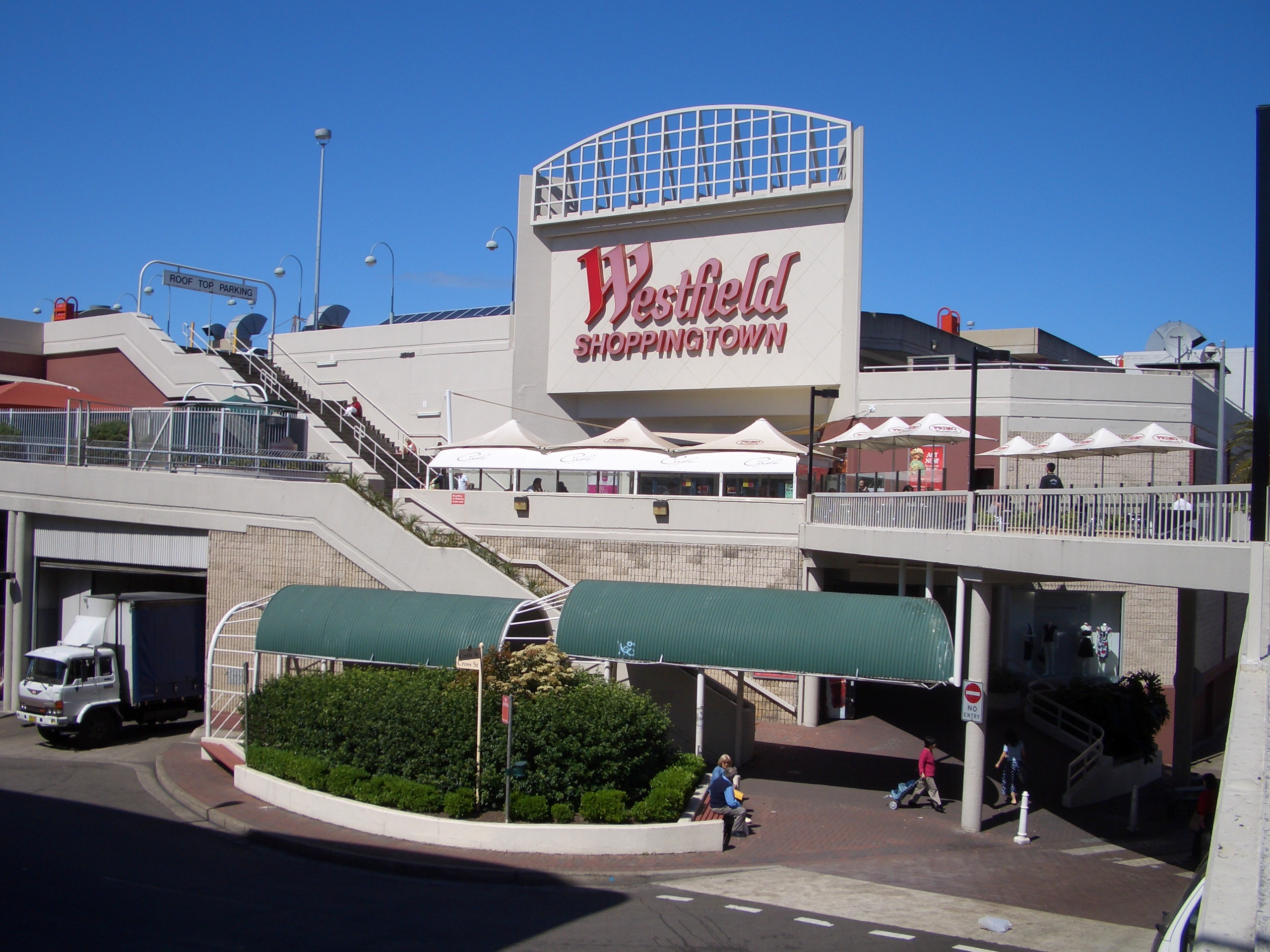 Westfields Hurstville, Cross Street, Hurstville, Sydney